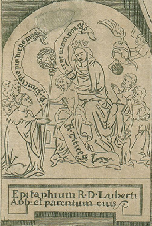 Epitaph von Abt Lubert Hautscilt (1347-1417), Darstellung mit seinen Eltern und Geschwistern vor Maria mit Jesuskind, Familien-Wappen; Kloster St. Bartholomäus in Eeckhout bei Brügge, um 1420, Abbildung auf einem Stich von 1671